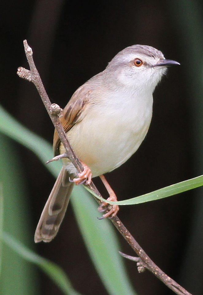 Tawny-flanked Prinia, Prinia subflava at kruger Park